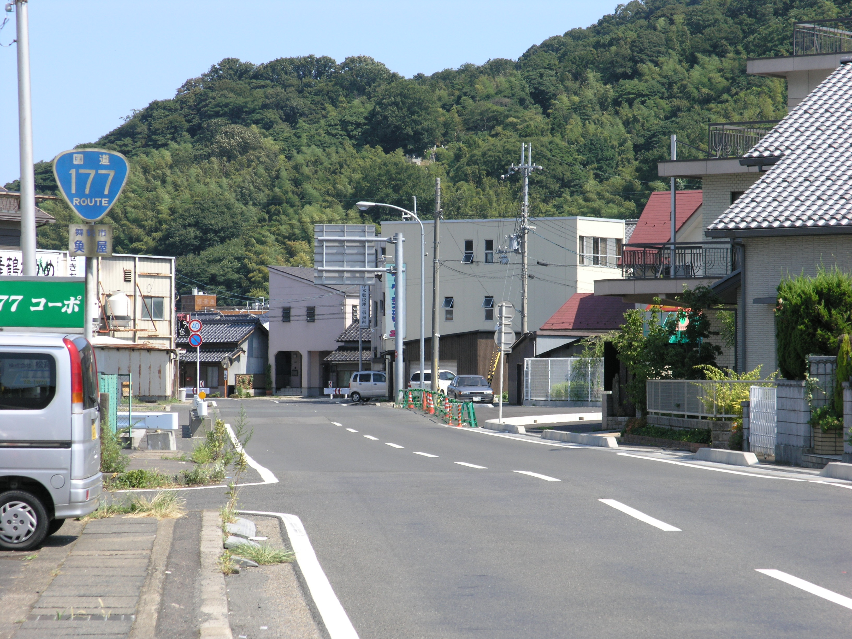 国道177号 (京都府舞鶴市) 2008年8月撮影。 機材：C8080WZ 撮影者：Kansai explorer